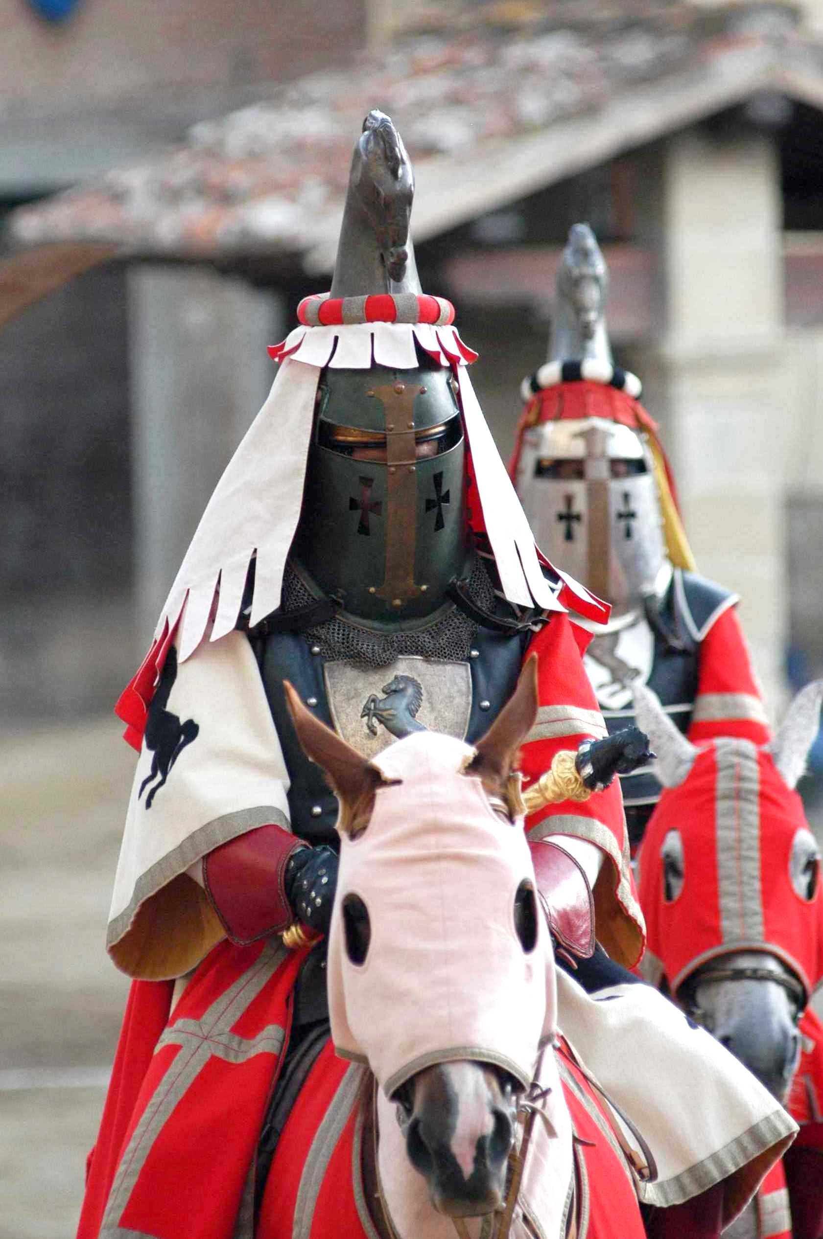 Giostra del Saracino ad Arezzo: il Maestro di Campo, massima autorità sulla Lizza, seguito dal suo vice.